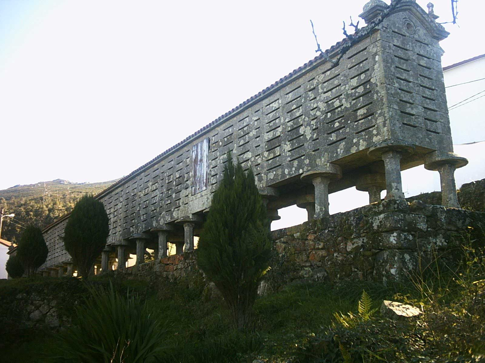 Vista do hórreo de Lira